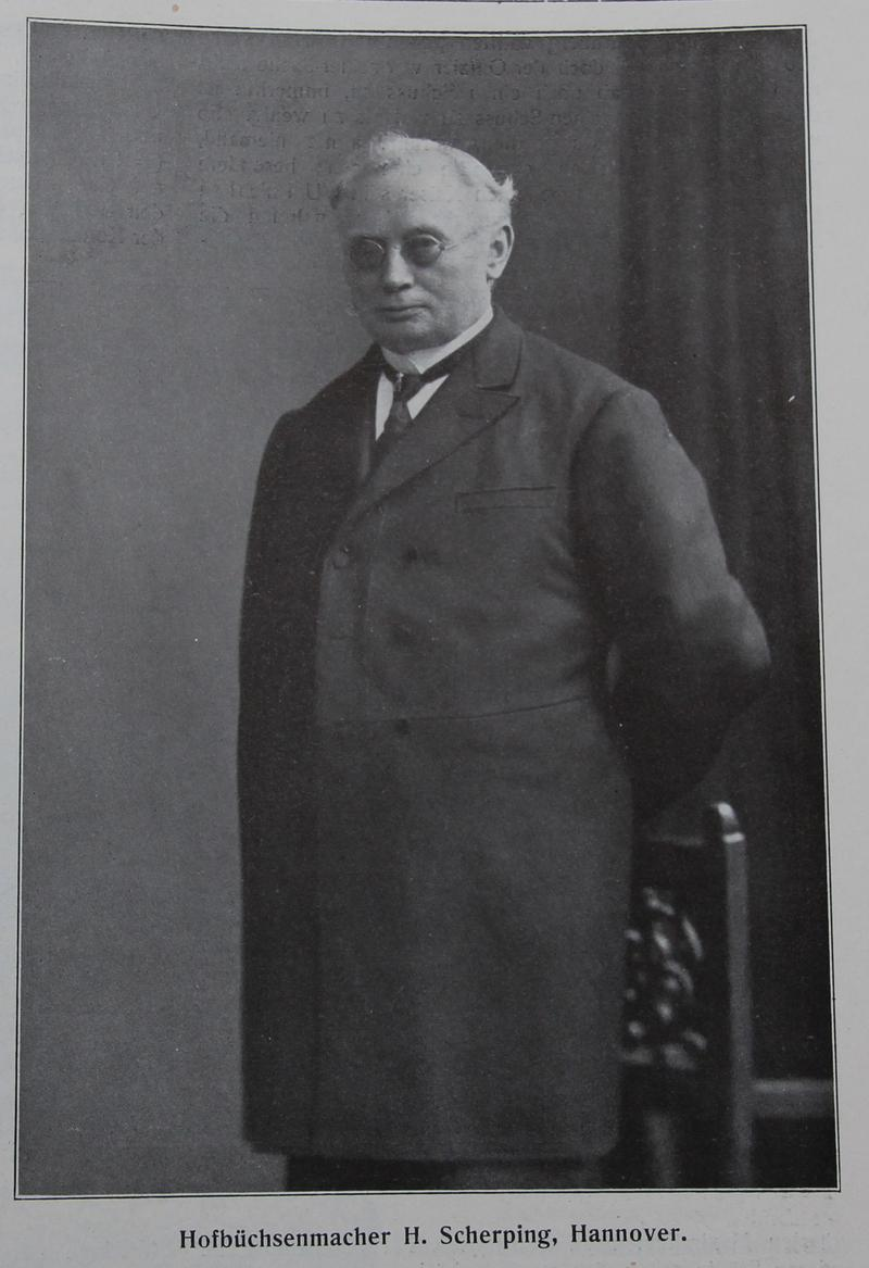 Um 1900 gefertigte Atelieraufnahme des Königlich Hannoverschen Hofbüchsenmachers Heinrich Scherping (1831–1913) ...